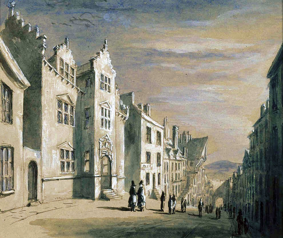 Plas Mawr Conwy Wales